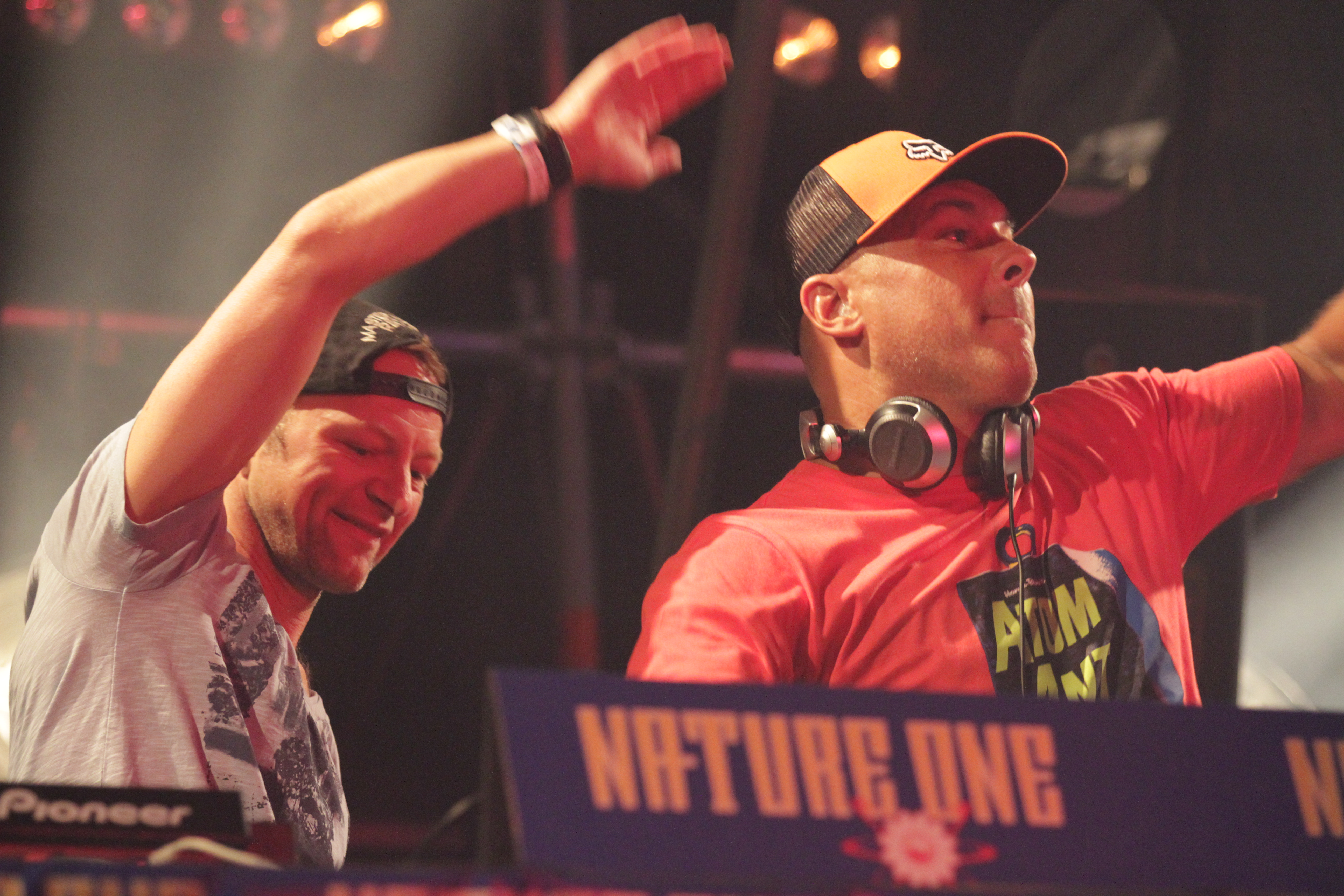 Charlie Lownoise (links) & Mental Theo auf der Nature One 2013